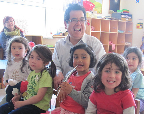 Luis Alberto Tamayo junto a alumnos del colegio Altamira.